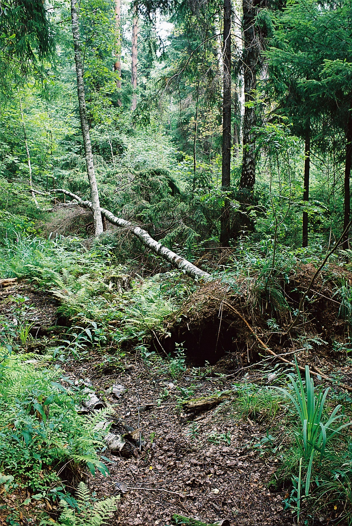 Autor: Adrian Grzegorz Rok wykonania: 2005